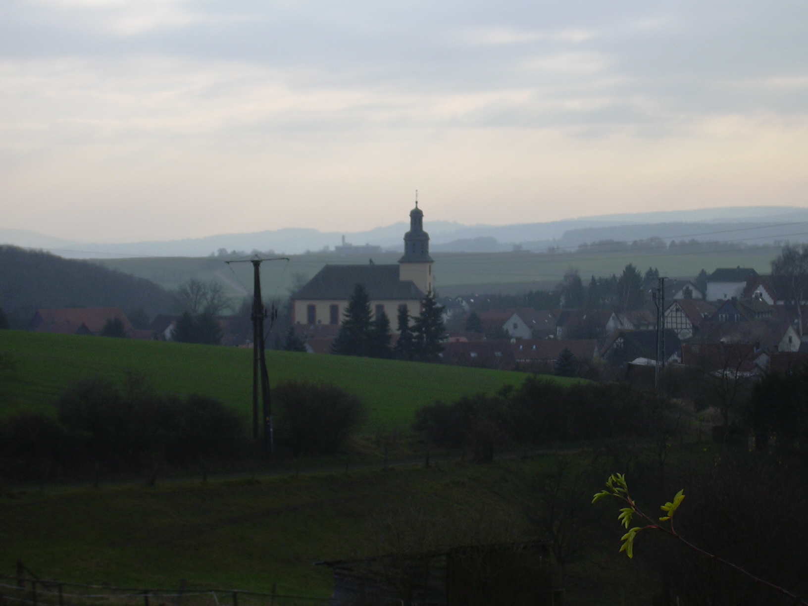 Ortsansicht von Oberweimar (Gemeinde Weimar/Lahn) mit Blick auf die Martinskirche